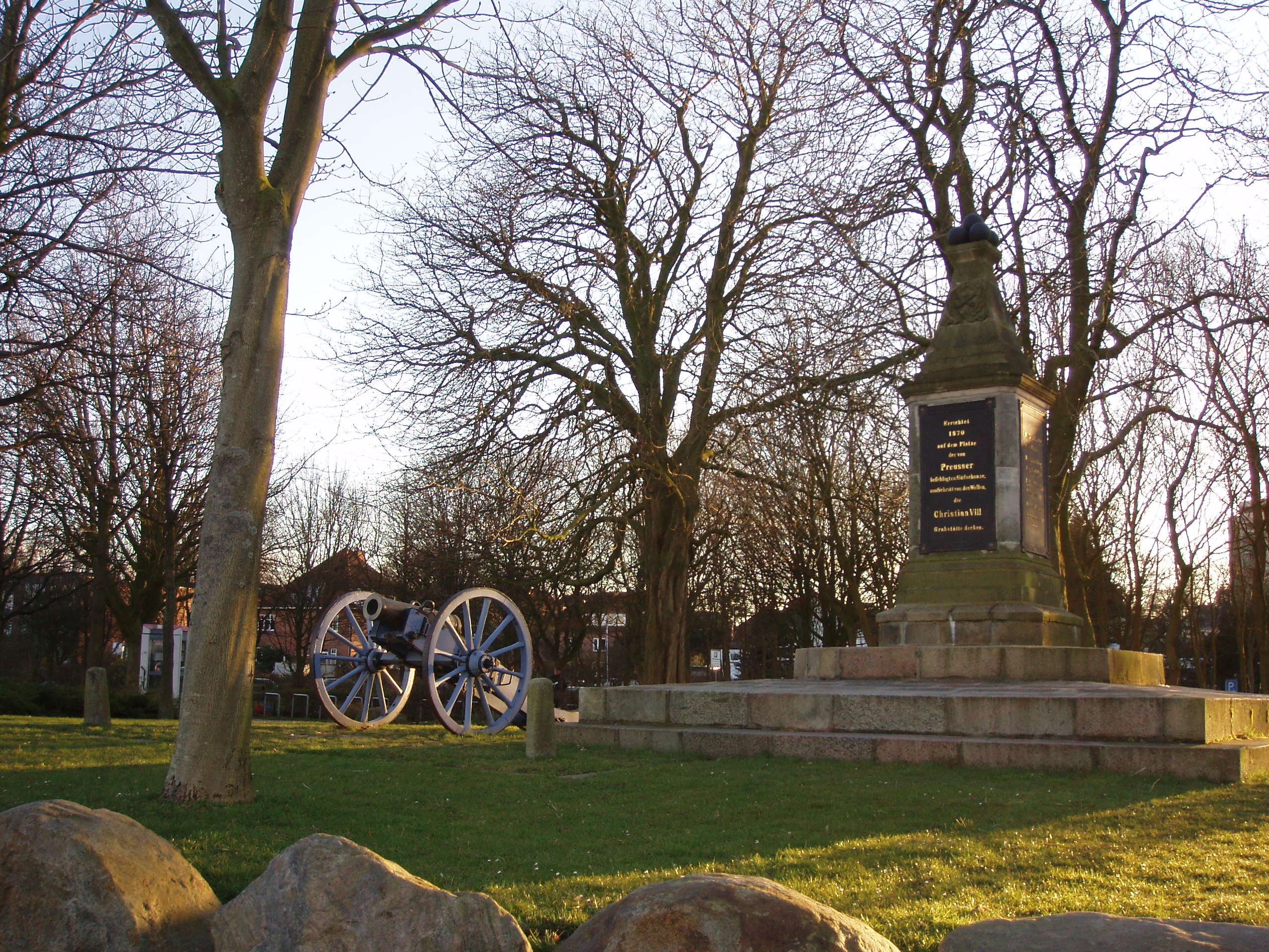 Erinnerung an den Schleswig-Holsteinischen Krieg, Kurpark Eckernförde